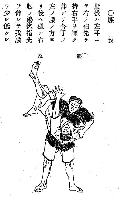 Ogoshi